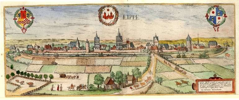 "Stadt Lippe" 1588